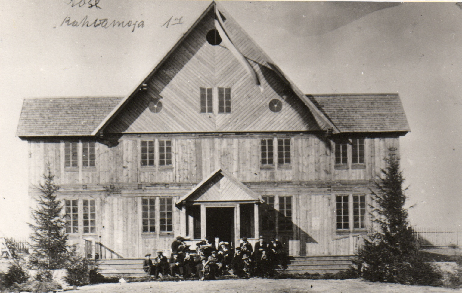 Kose Seltsimaja. Kose Seltsimaja avati 22. augustil 1922. Hiljem toimus suurem ümberehitus. Maja põles maha 1941. aastal.